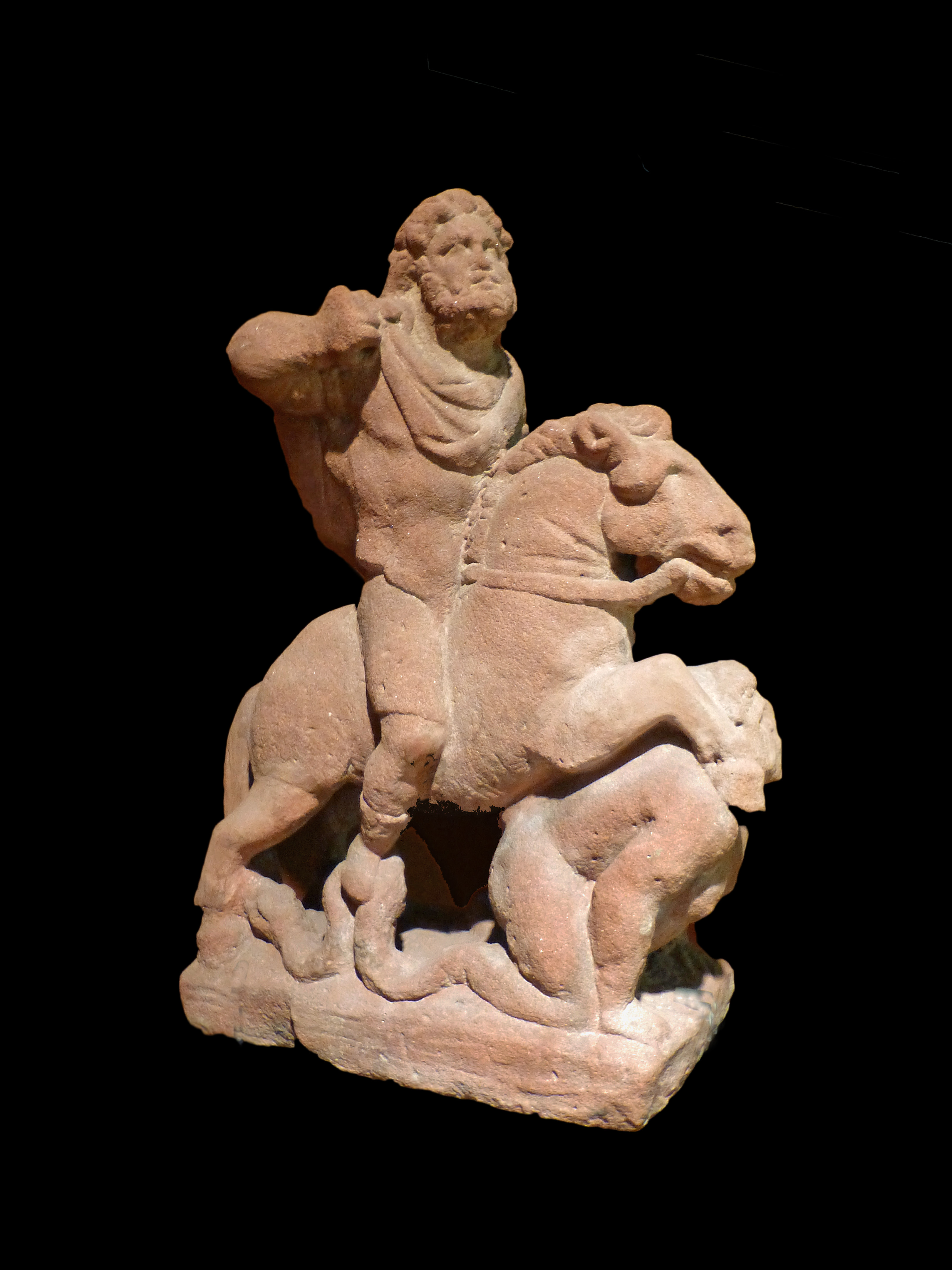 Musée historique de Haguenau (Bas-Rhin) : groupe sculpté de Jupiter Taranis terrassant un monstre anguipède, découvert à Seltz en 1846. Grès IIe siècle. N° R192a